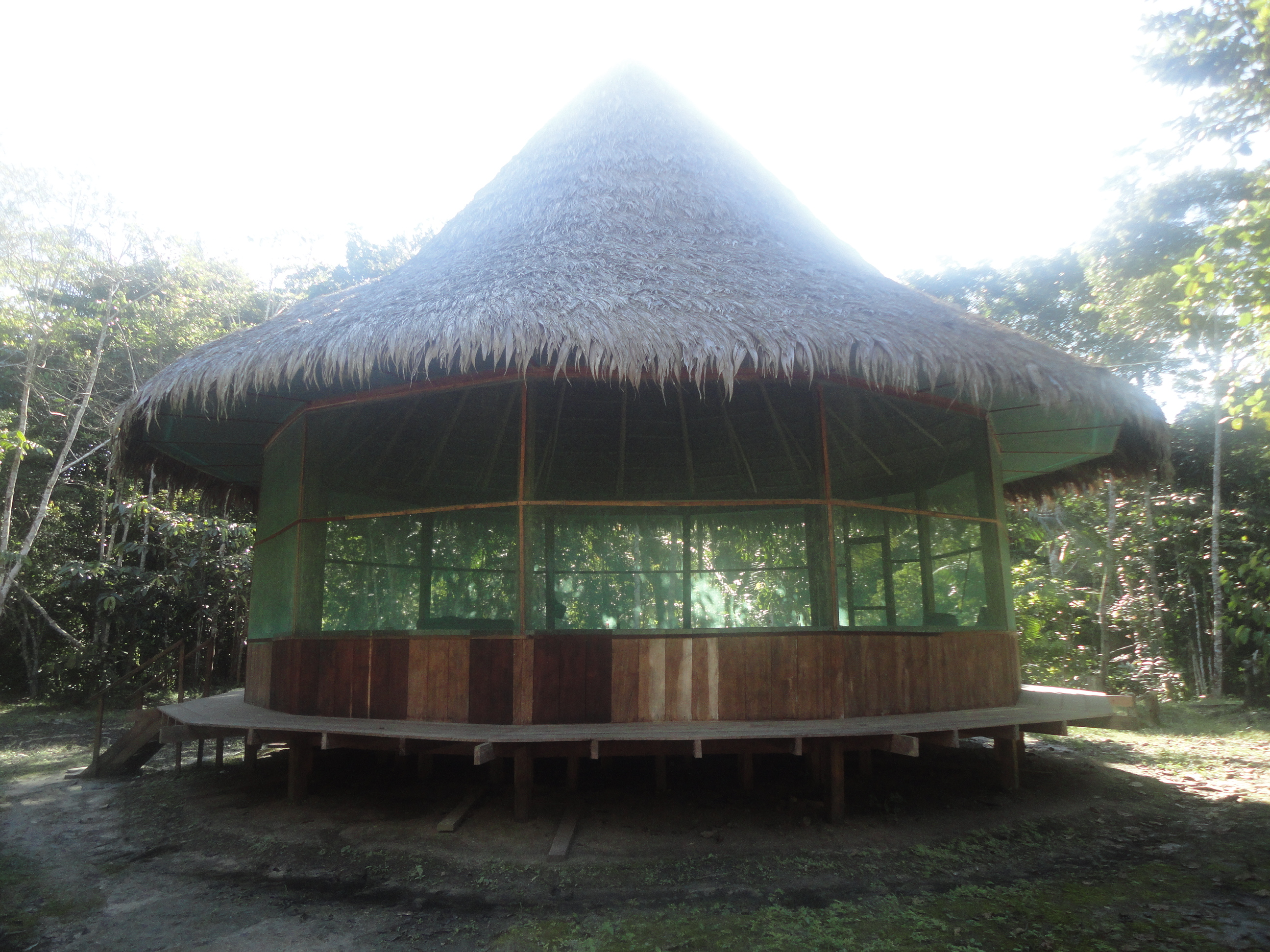 Casa ceremonial donde se realizan las ceremonias de ayahuasca en la selva peruana - iquitos - Peru